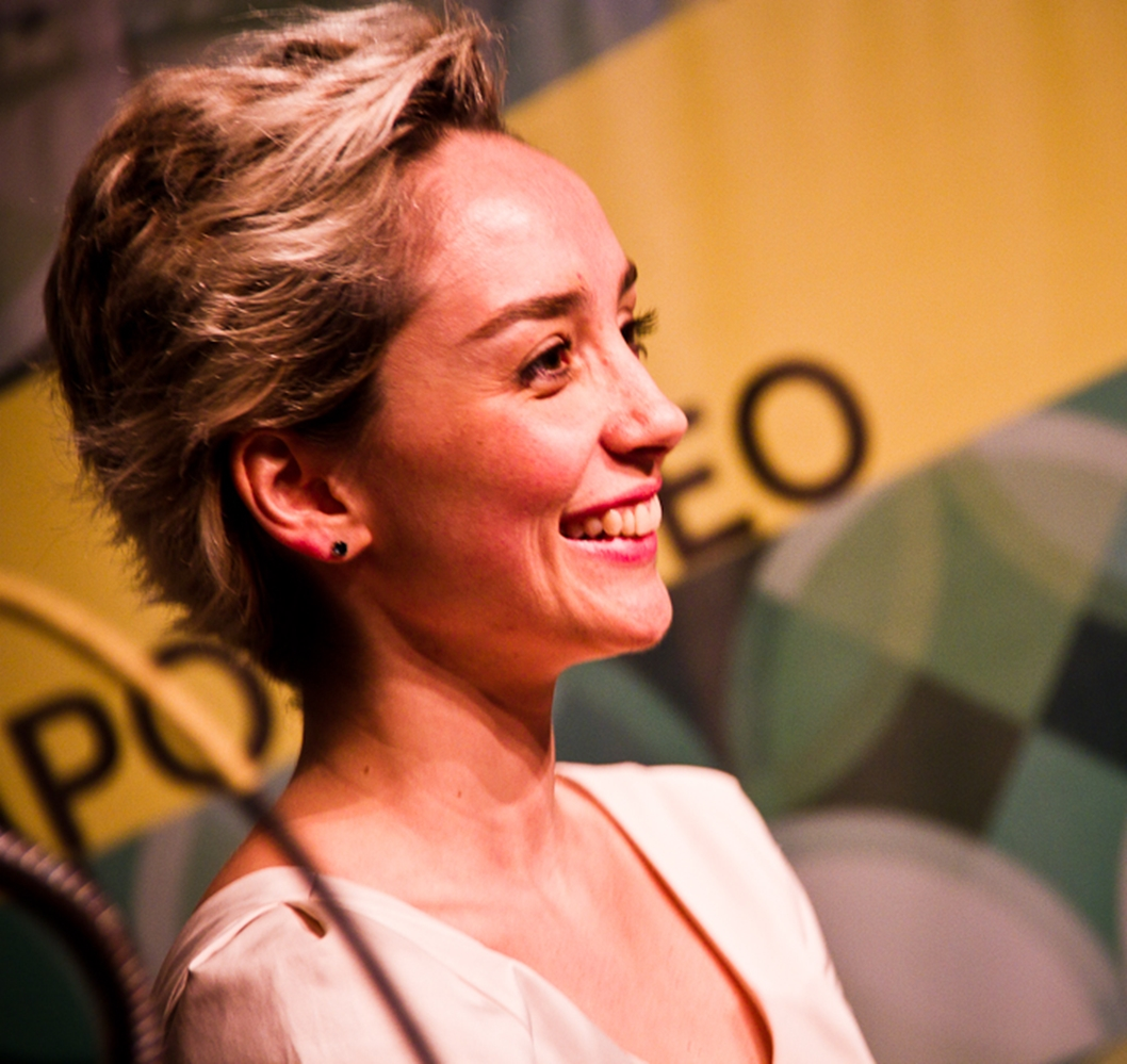 Simone Spoladore (Curitiba, 29 de outubro de 1979) é uma atriz brasileira.